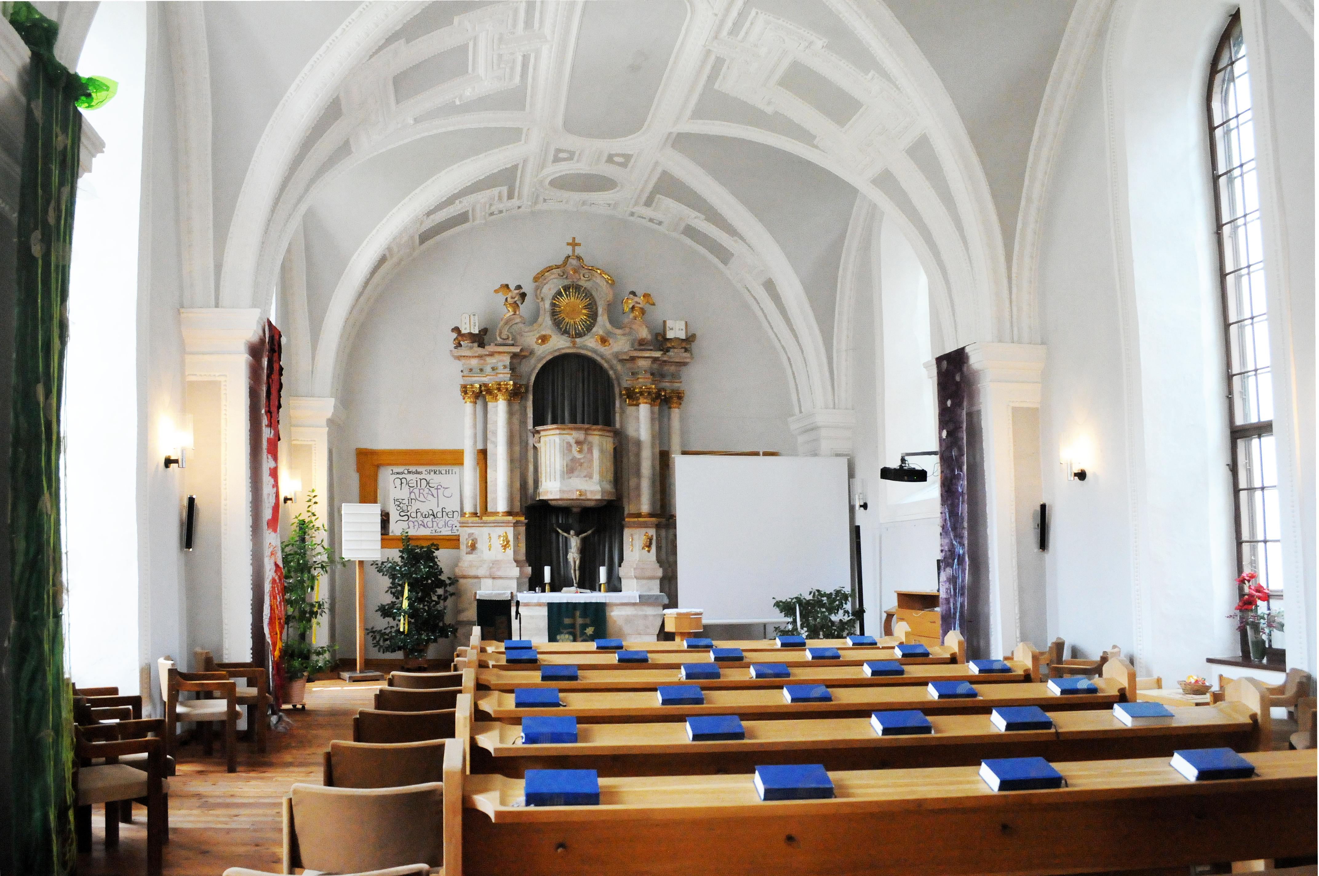 Evangelische Elisabethkirche Murau.Innenraum